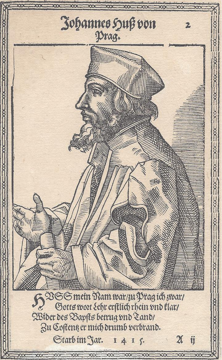 Christoph Murer, Jan Hus, wohl historisierende Darstellung.Holzschnitt aus Nicolaus Reusner: Icones sive Imagines virorum literis illustrium